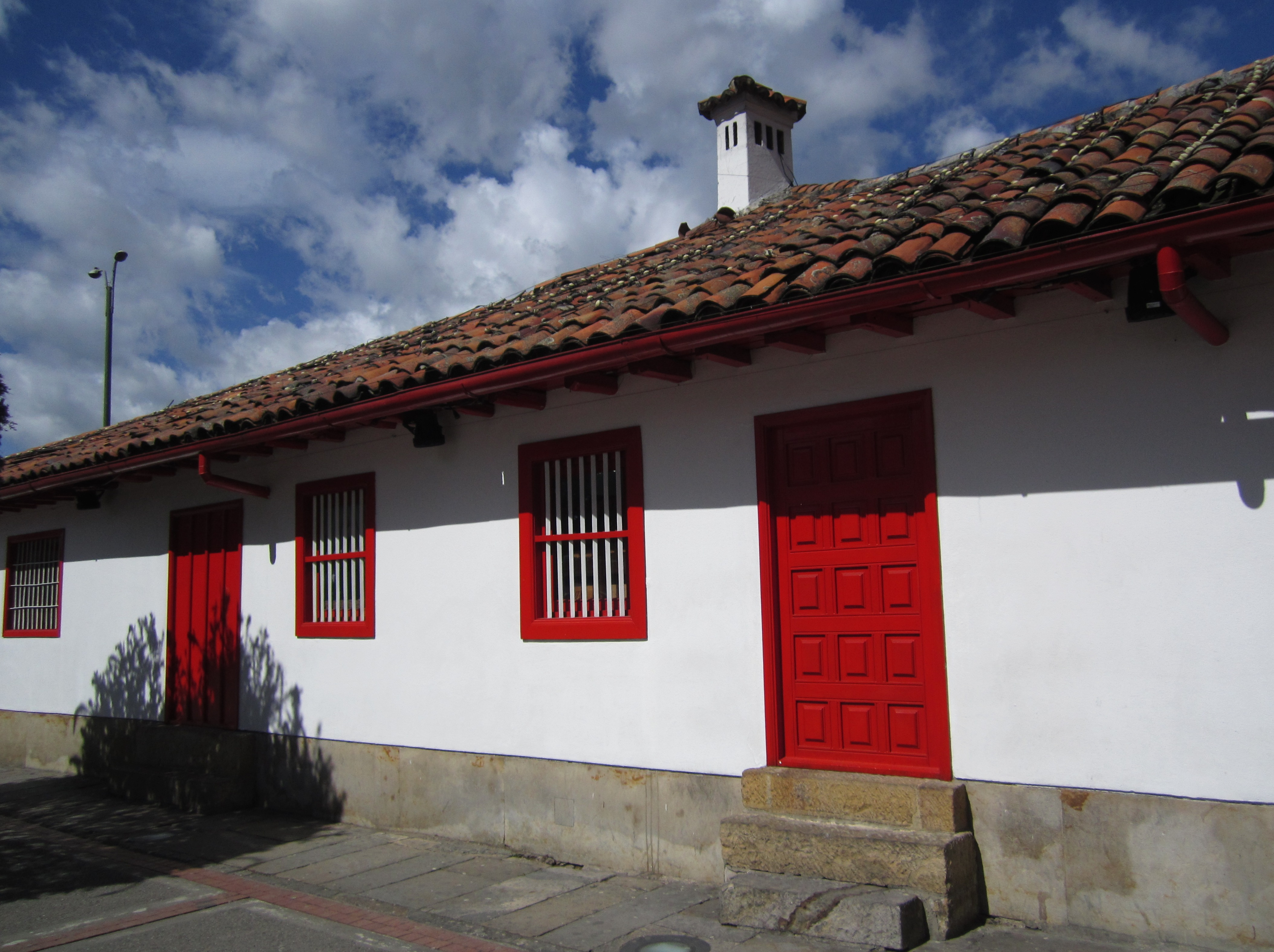 Av. carrera 7 centro comercial Hacienda Santa Bárbara. Localidad de Usaquén.